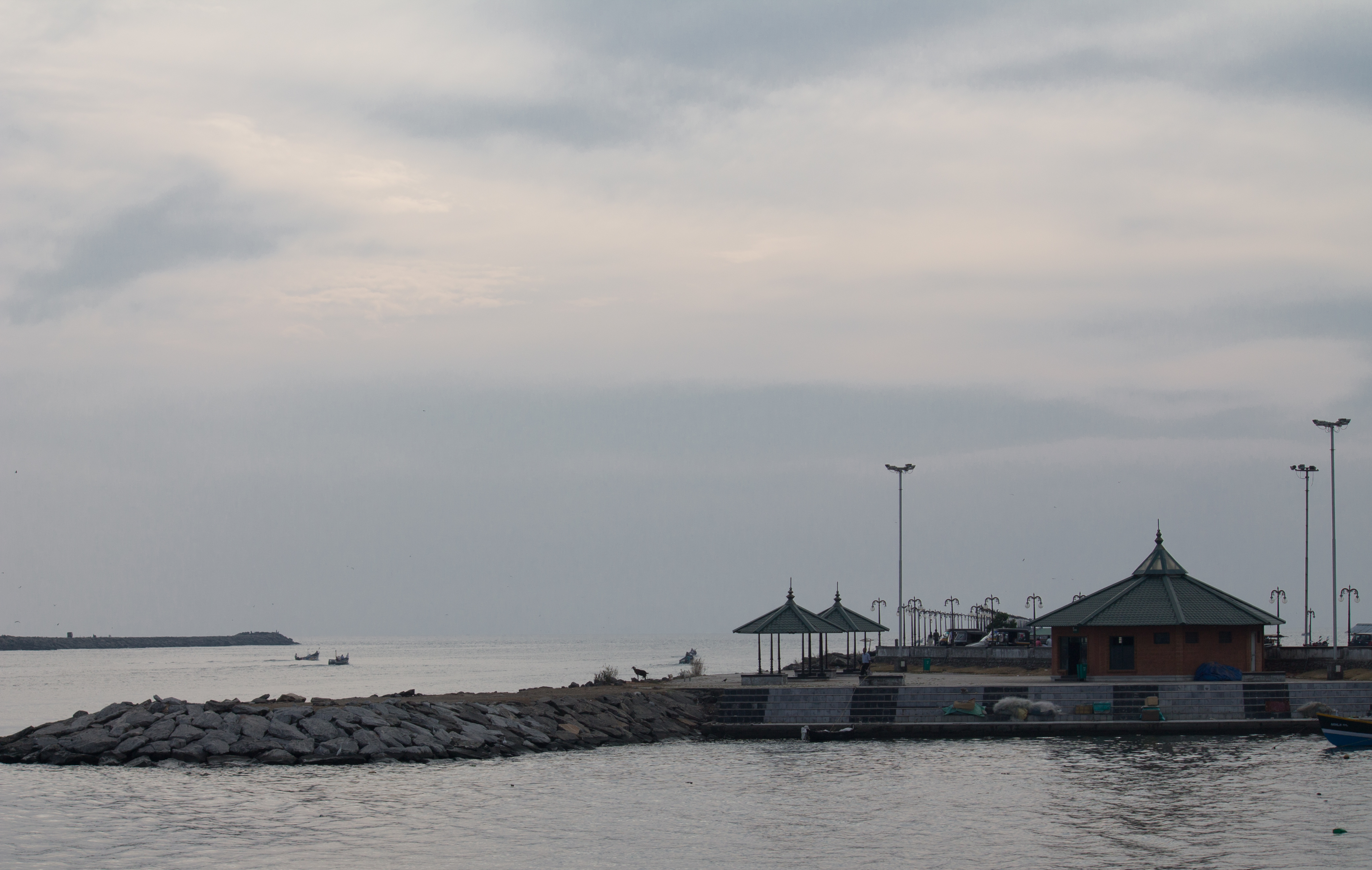 Ponnani harbour